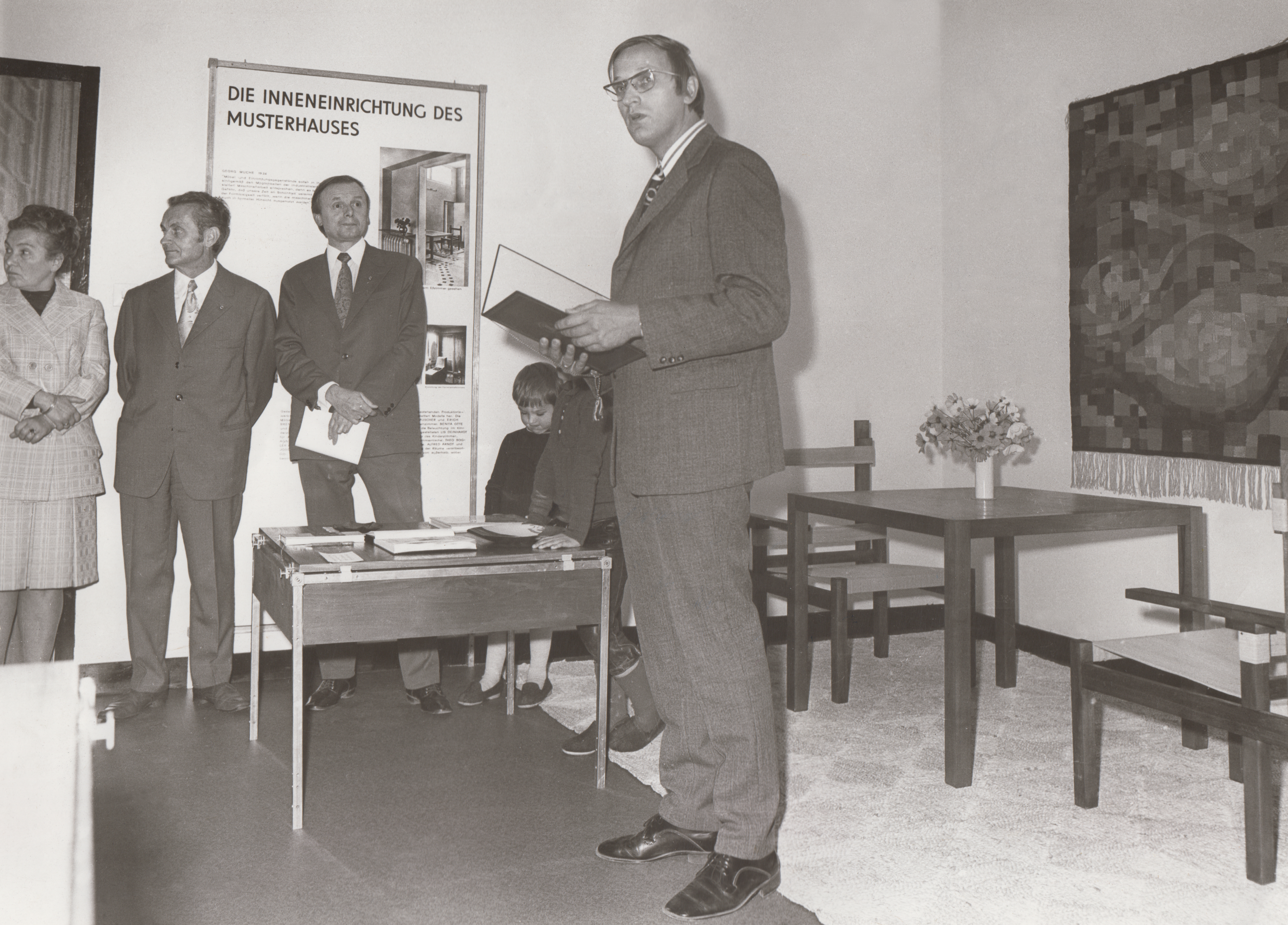 Eröffnung Ausstellungskabinett 50. Jubiläum